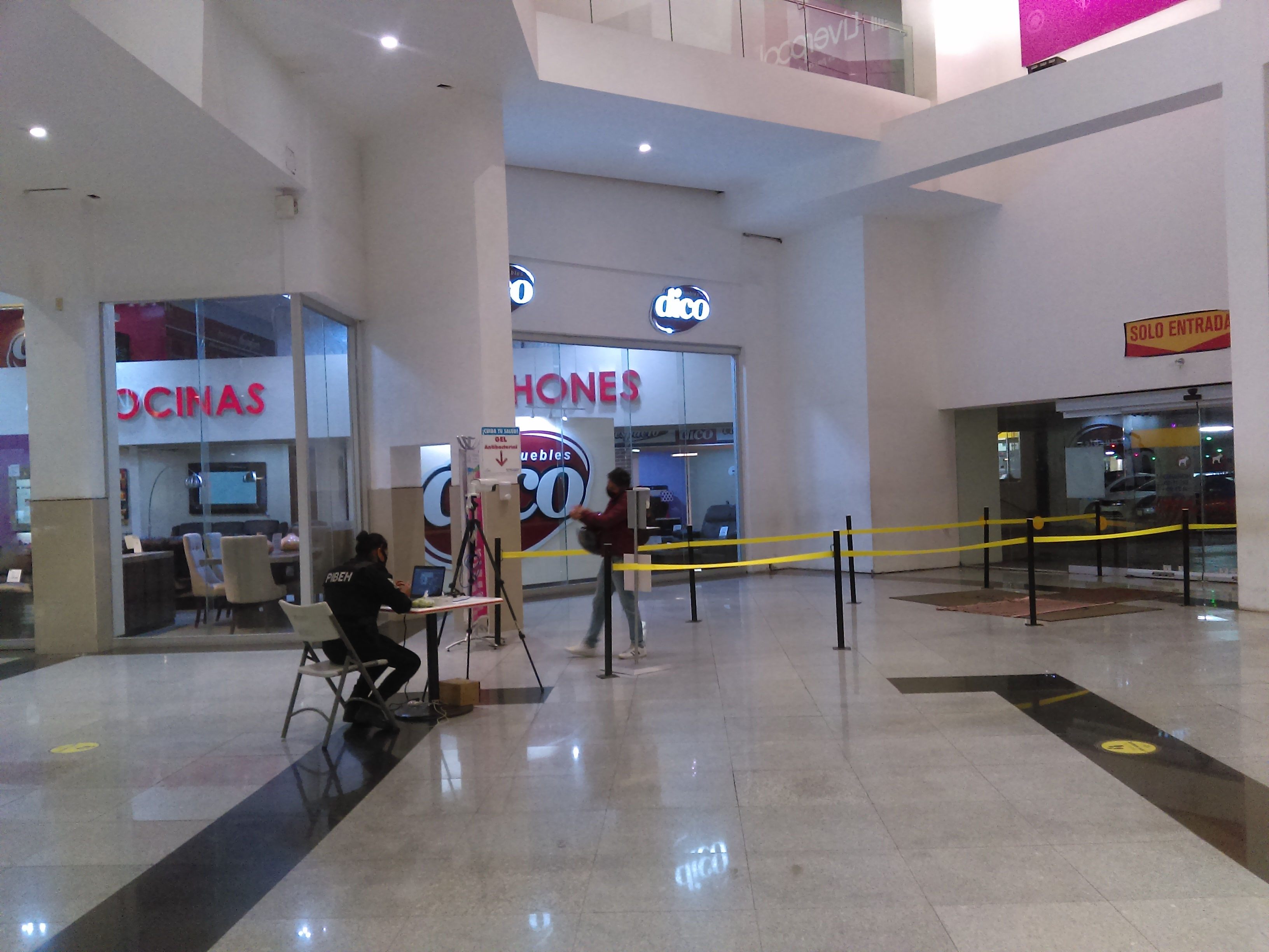 Plaza Galerías Pachuca en su reapertura después de la pandemia de COVID-19.